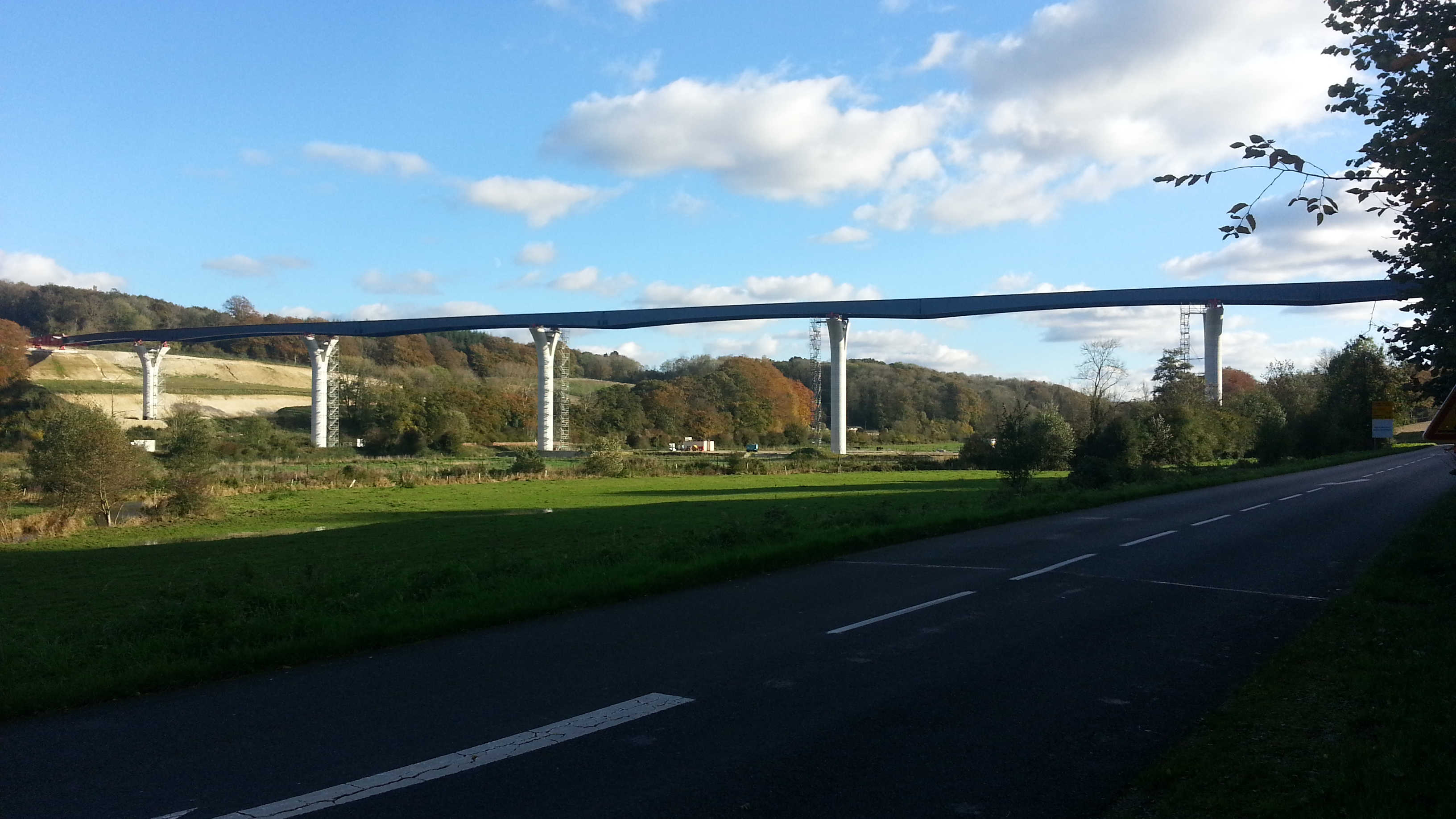 Le viaduc de la Scie en novembre 2013